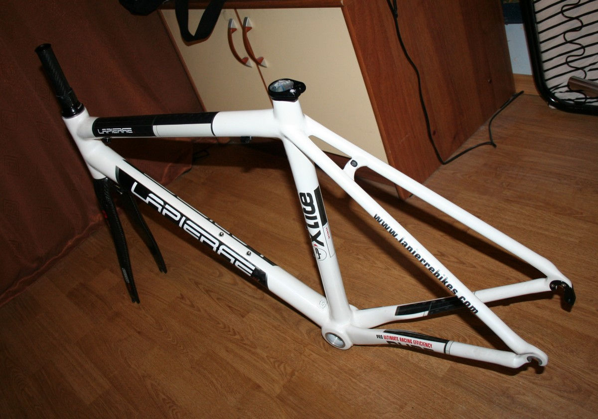 Rama rowerowa firmy Lapierre